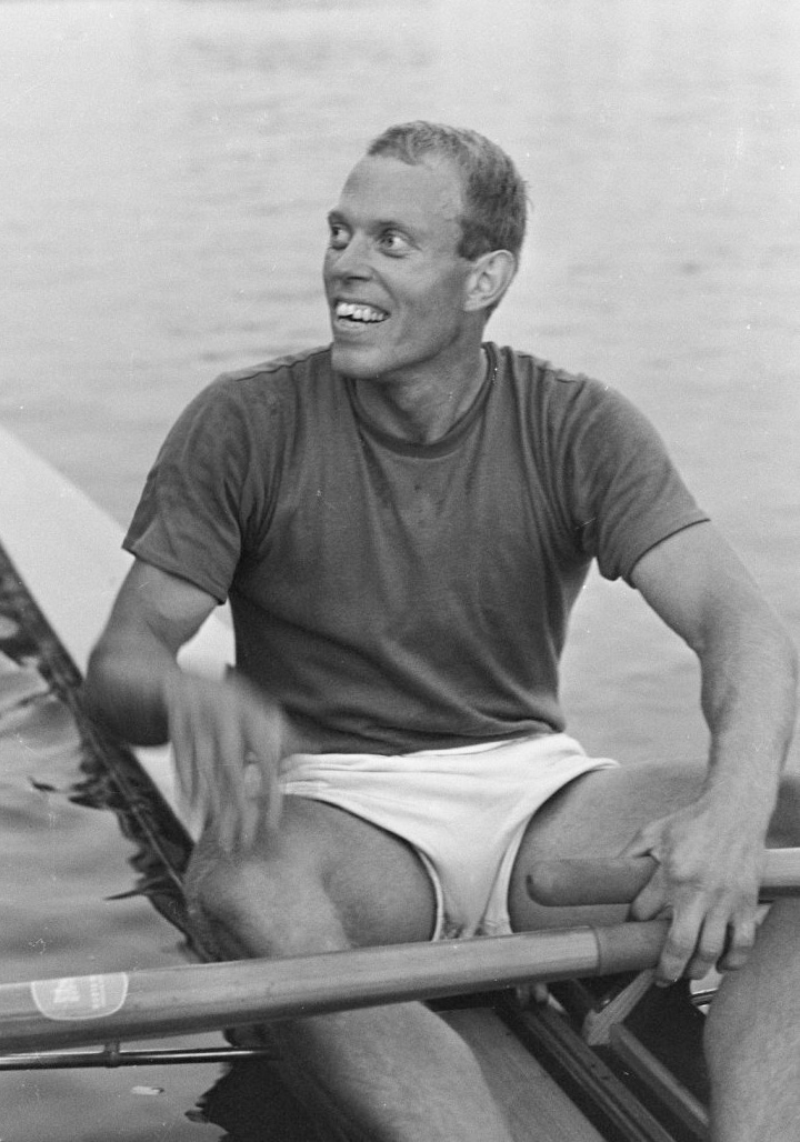 Jan Wienese